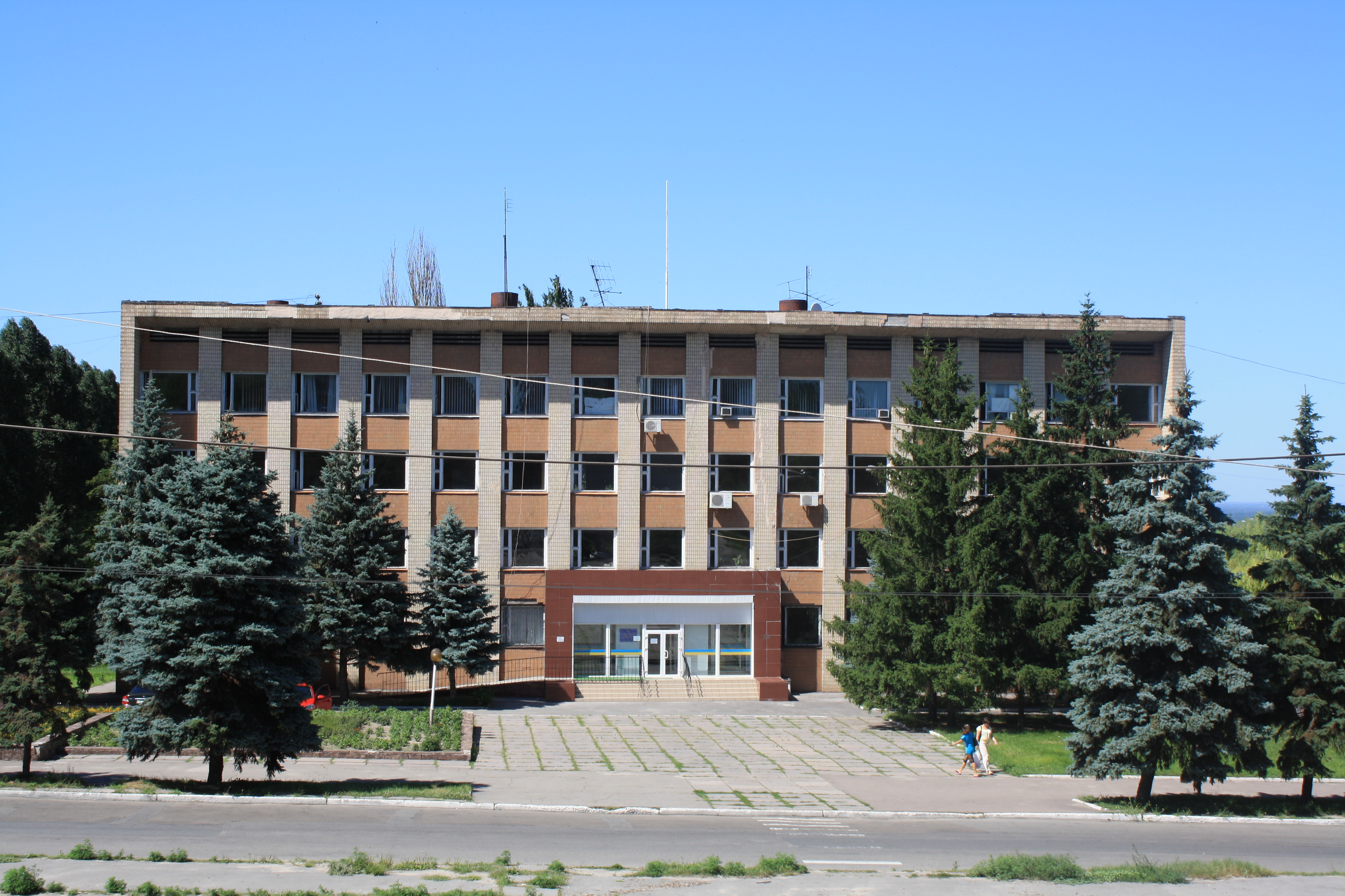 Дніпровська районна рада міста Дніпродзержинськ